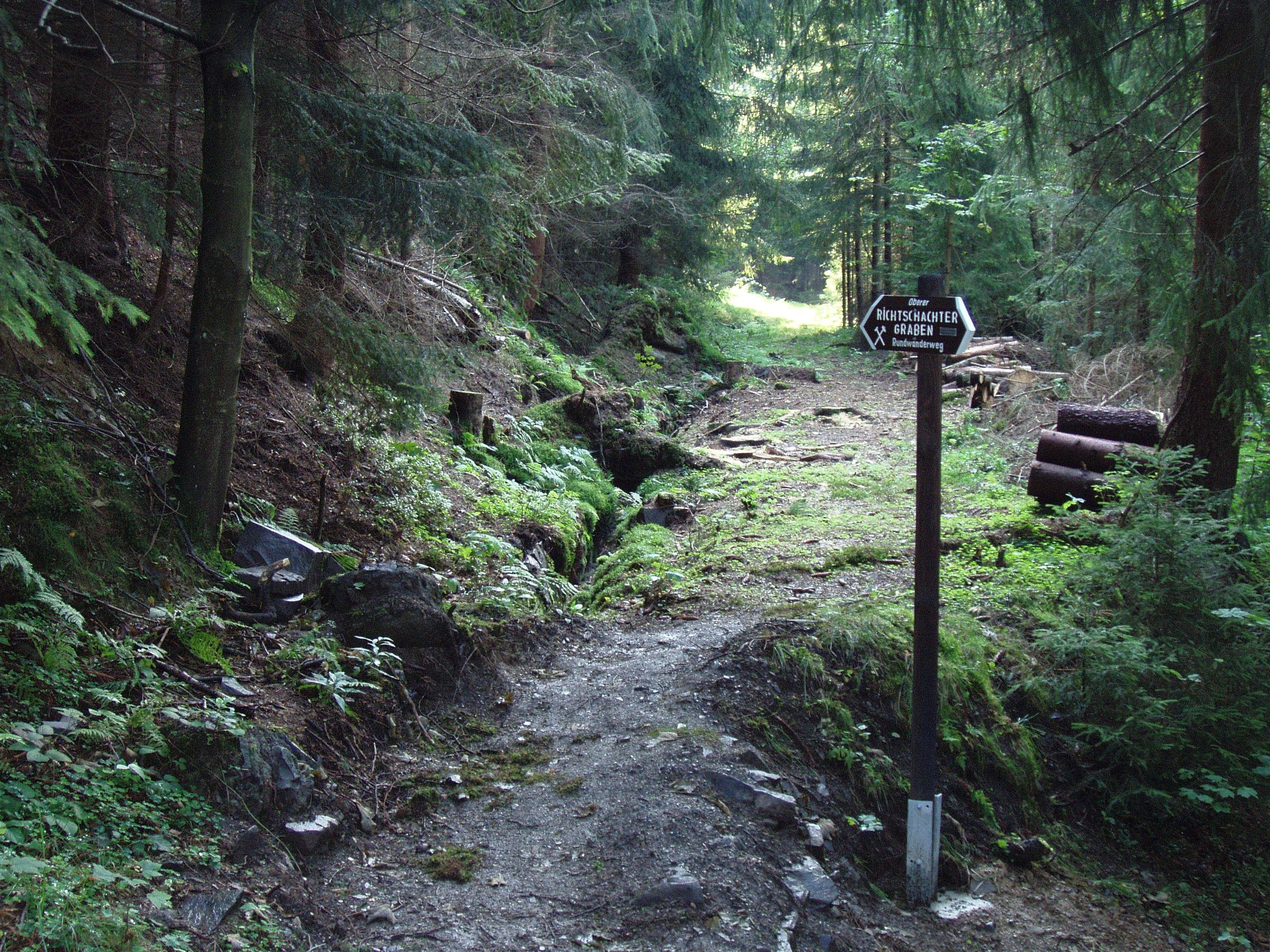 Oberer Richtschachter Graben in Lautenthal/ Harz